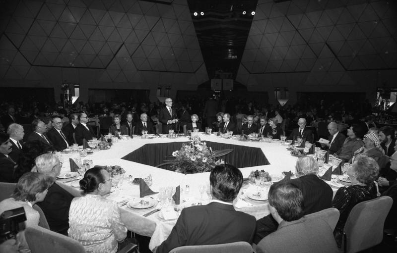 Berlin, 40. Jahrestag der DDR, Empfang ADN-ZB / Mittelstädt / 7.10.89 / Berlin: Empfang Zu einem festlichen Empfang anläßlich des 40. Jahrestages der DDR hatte der Generalsekretär der SED und Vorsitzende des Staatsrates der DDR, Erich Honecker, am Abend in den Palast der Republik verdienstvolle Bürger aller Klassen und Schichten sowie ausländische Gäste der Feierlichkeiten eingeladen. L. neben E. Honecker: Michail Gorbatschow. Abgebildete Personen: Honecker, Erich: Staatsratsvorsitzender, Generalsekretär des ZK der SED, DDR (GND 118553399) Honecker, Margot: Ministerin für Volksbildung, SED, DDR (GND 122782933) Stoph, Willi: Ministerpräsident, Staatsratsvorsitzender, Armeegeneral, SED, DDR Ceausescu, Nicolae: Präsident, Staatsratsvorsitzender, Generalsekretär des ZK der KP, Rumänien Jaruzelski, Wojciech: Staatspräsident, General, Polen Ortega Saavedra, Daniel: Staatspräsident, Nikaragua (GND 119055112) Arafat, Yasser: 1929-2004; Abu Ammar, auch Jassir Arafat, PLO, Präsident der palästinensischen Autonomiegebiete, Friedensnobelpreis 2004, Palästina# (GND 118503766) Gorbatschow, Michail: Präsident, Vorsitzender des Obersten Sowjets, Friedensnobelpreisträger, Sowjetunion